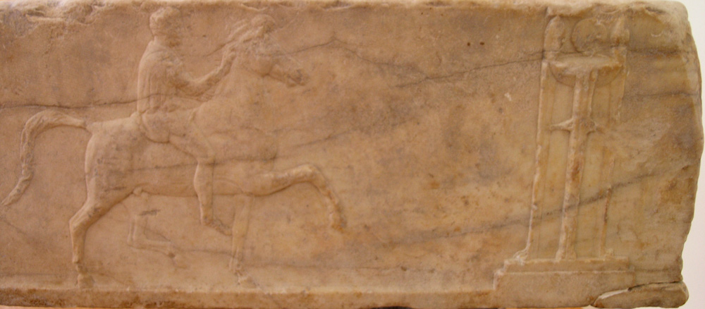 Base d'une dédicace, en marbre, trouvée sur l'agora d'Athènes. Base d'une dédicace pour des victoires dans un concours de bataille de cavalerie (anthippasia). Trois côtés de la base portent des bas-reliefs représentant un cavalier se dirigeant vers un tripode. L'inscription sur le quatrième côté donne le nom des dédicants victorieux et aussi celui du sculpteur, Bryaxis, auteur du monument. La base supportait le tripode de bronze dédié aux vainqueurs. Milieu du IVe s. av. J.-C.